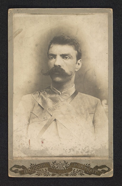 Милан Матов